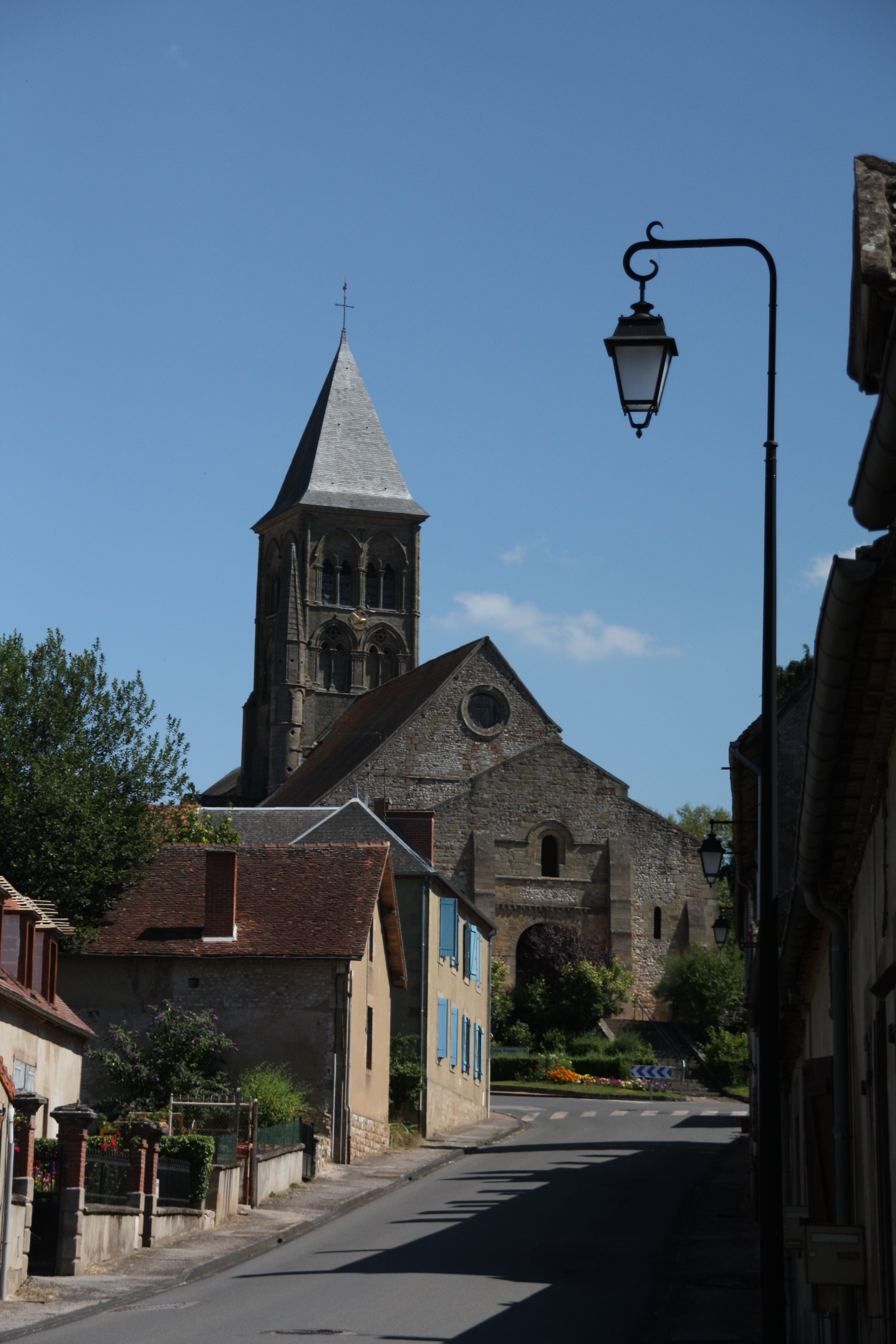 Église romane à Saint-Menoux, Allier, France